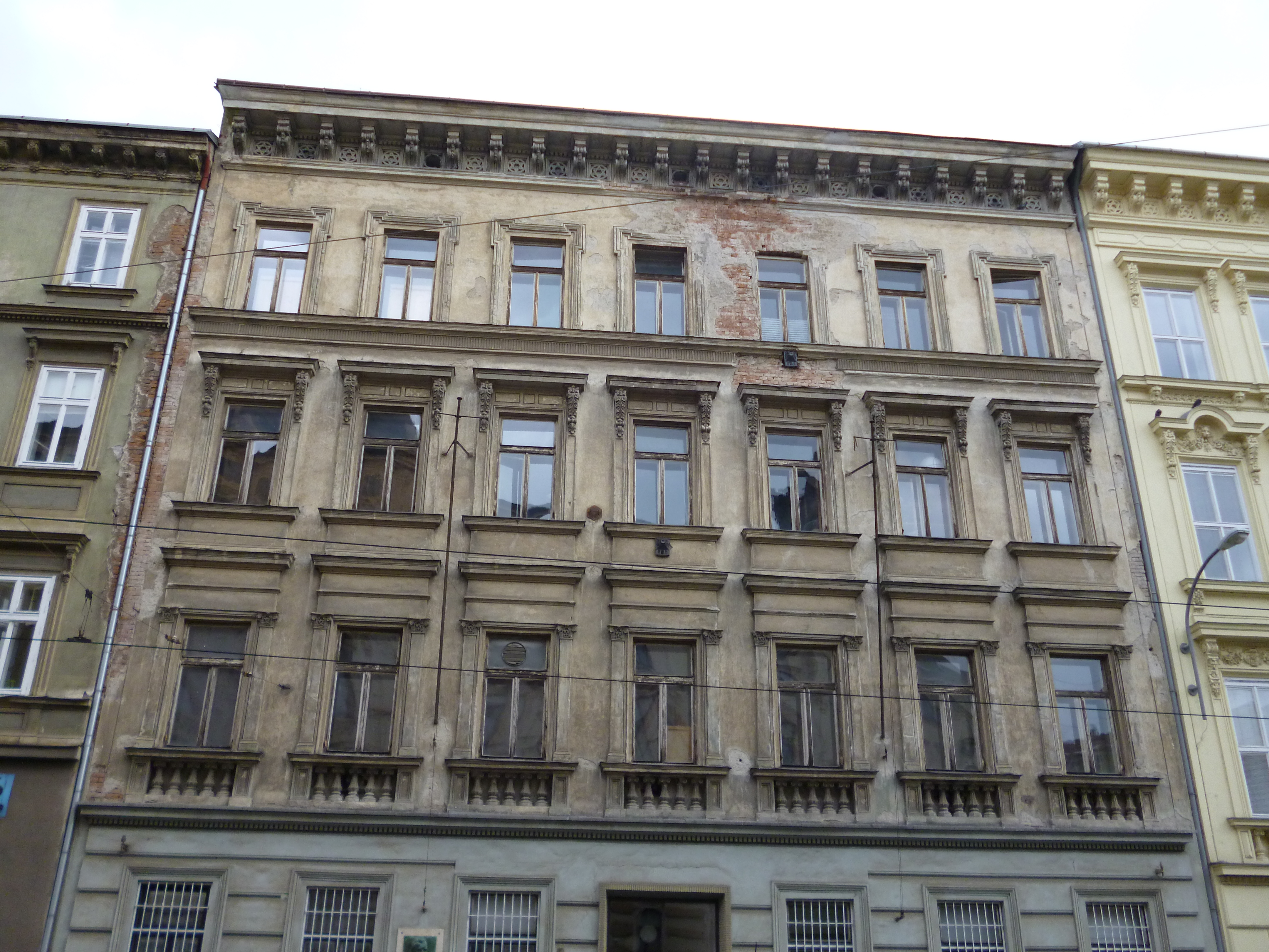 Činžovní dům (Brno), Brno - město, Rooseveltova 590/13, Brno (bývalé Slovanské gymnázium)